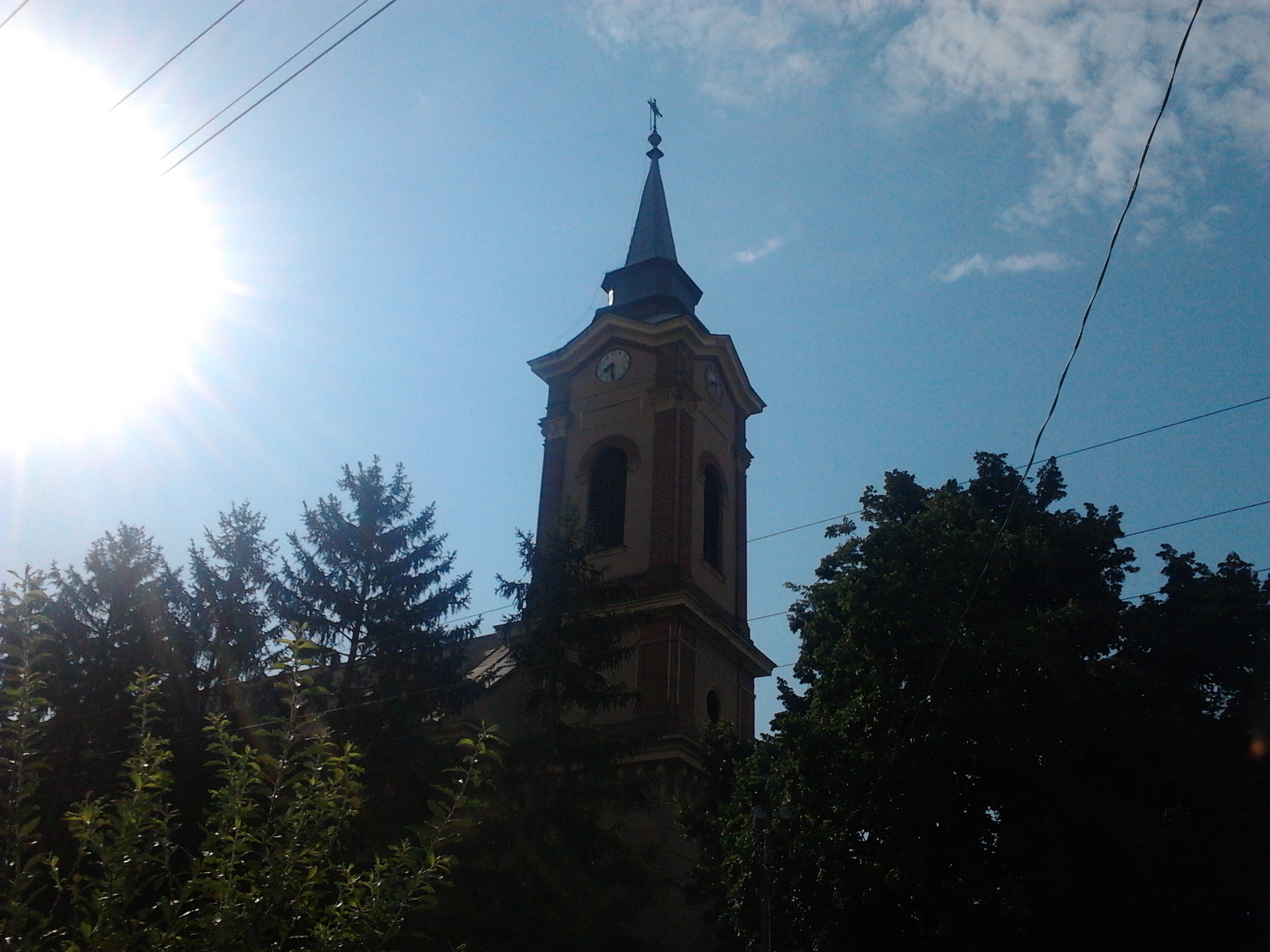 Vámosgyörk település templomának látképe.